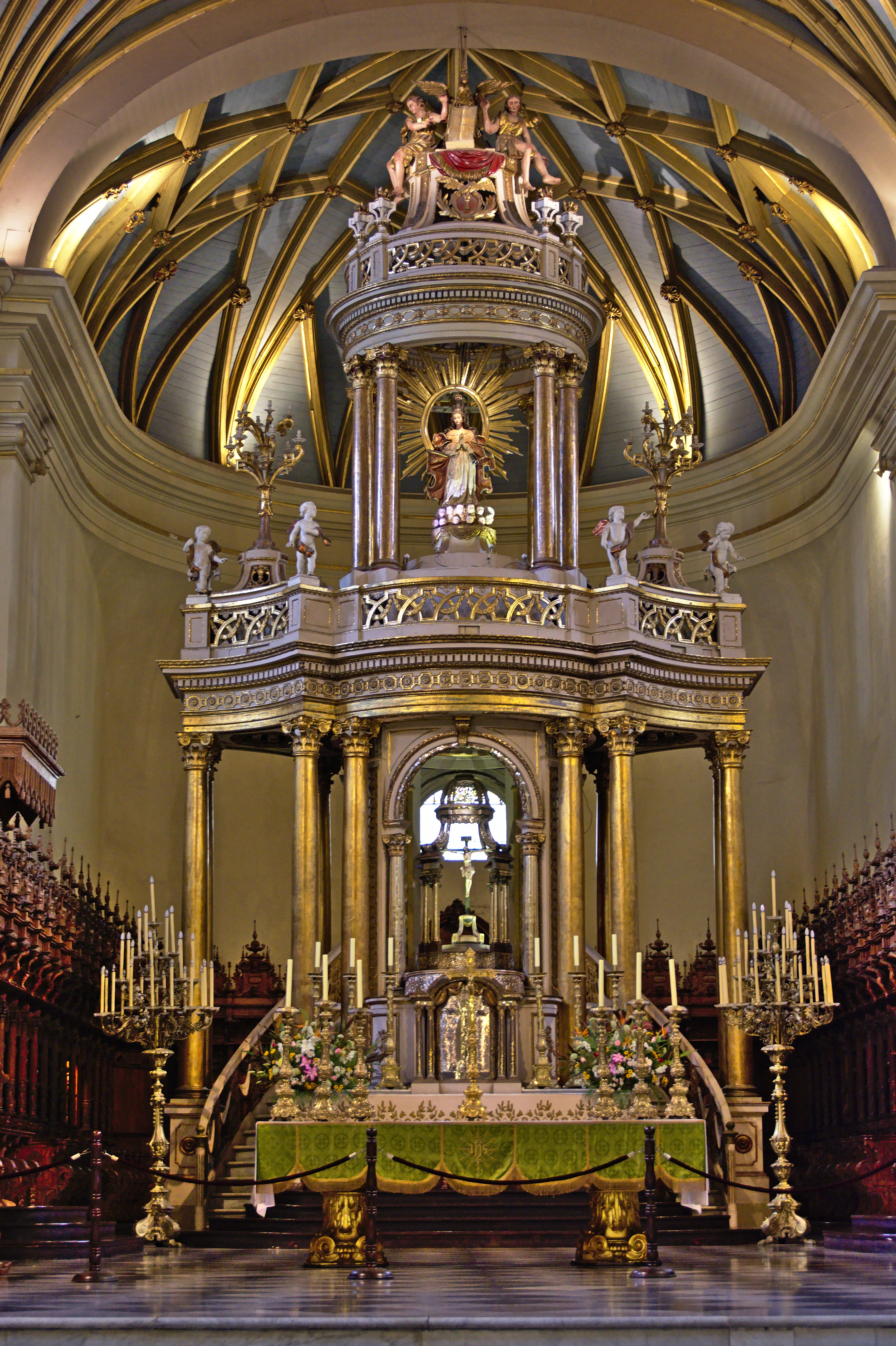 Altar in Catedral de Lima, centre of Lima, Peru